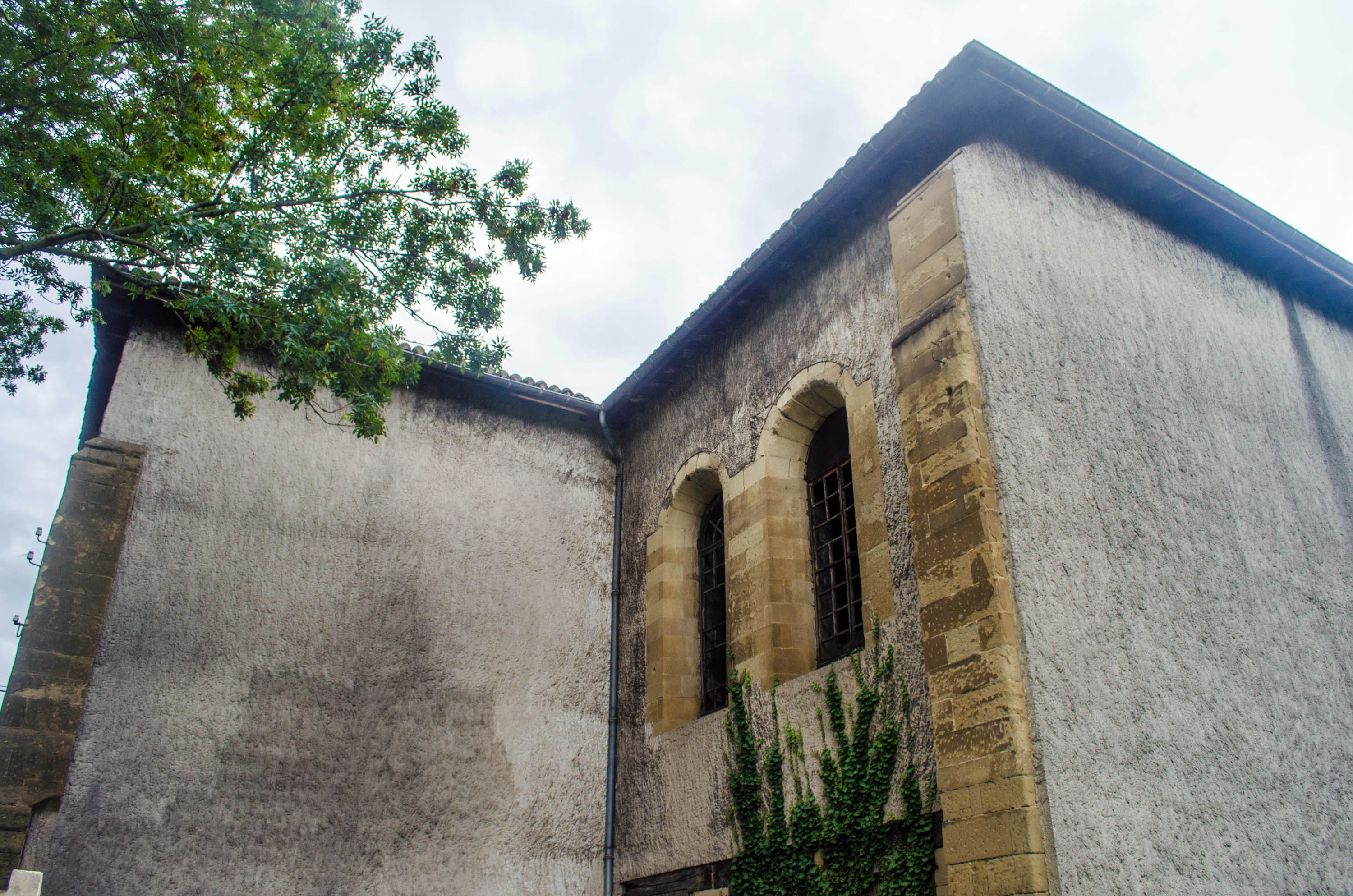 Valence (Drôme), Abbaye Notre-Dame de Soyons, transept et abside